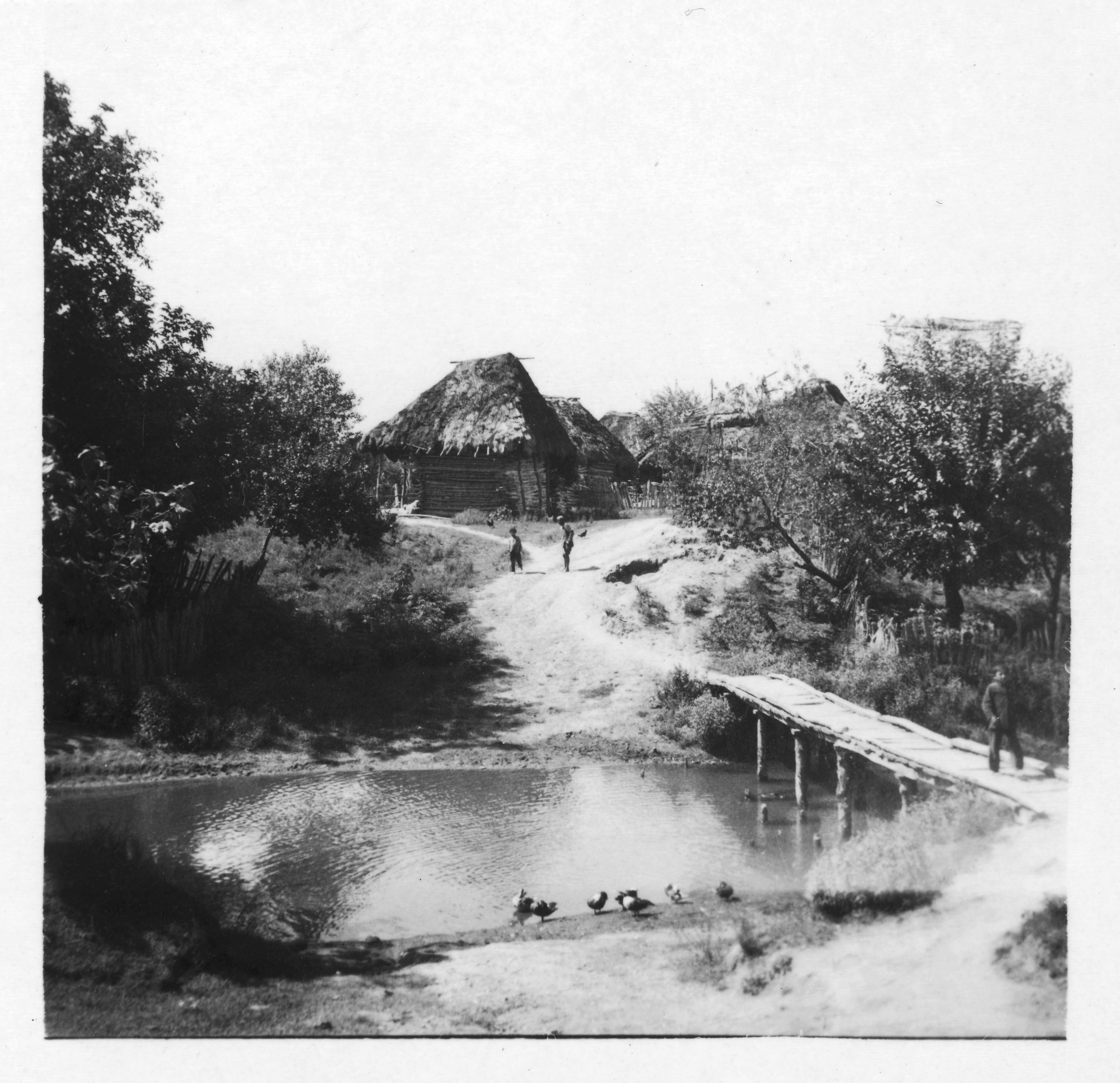 Persien, Mazanderan (Mazandaran): Dorf; Abgelegenes Dorf